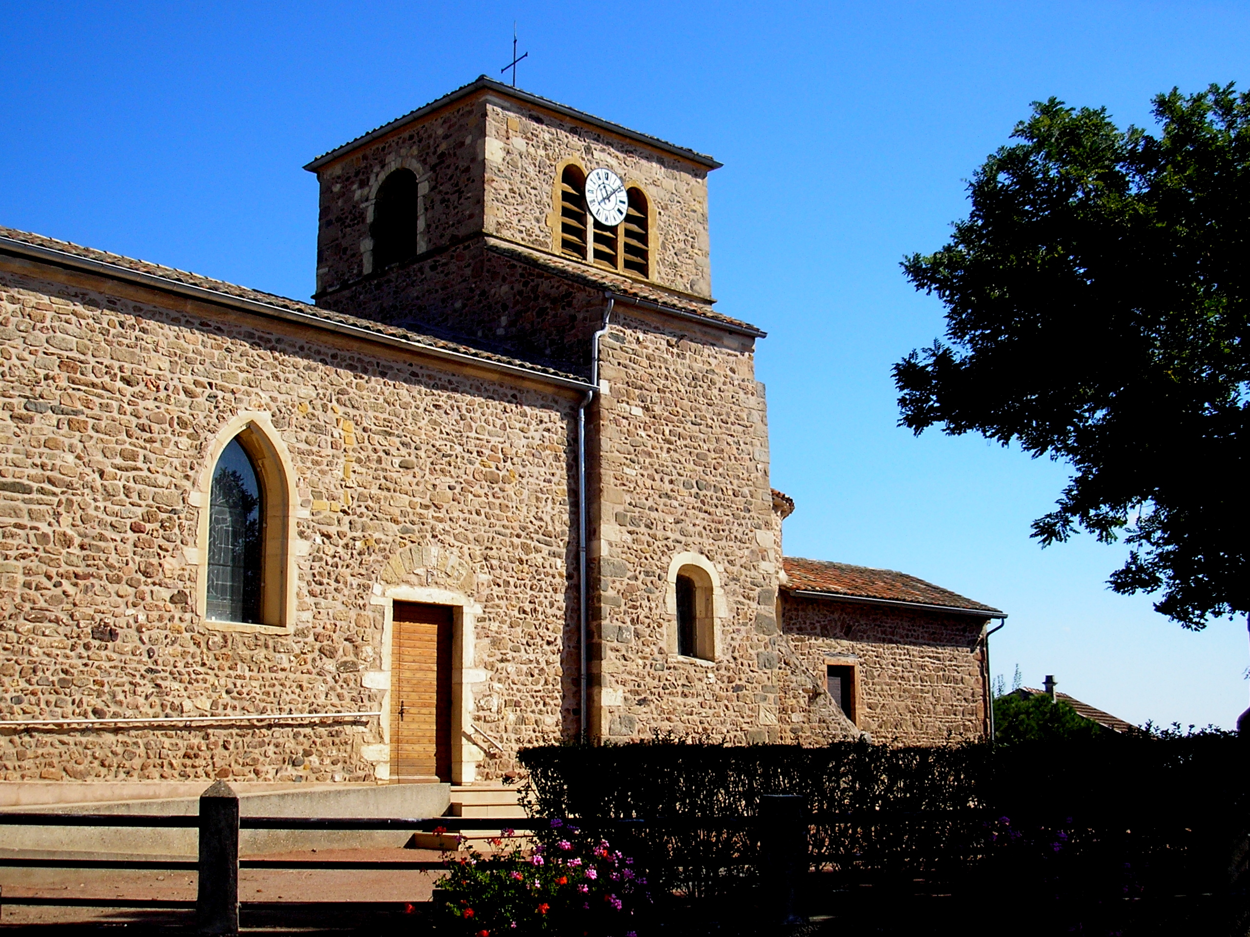 Eglise de Saint Etienne la Varenne